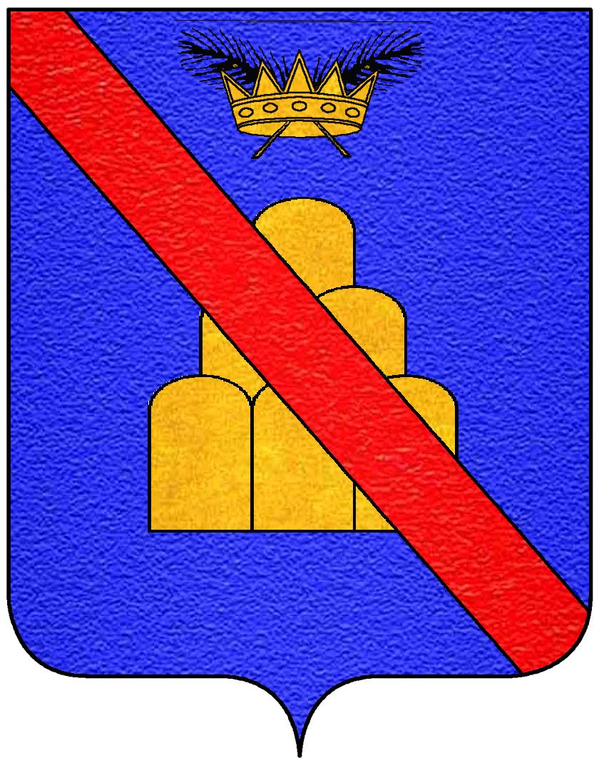 Stemma della famiglia Ridolfi di Piazza